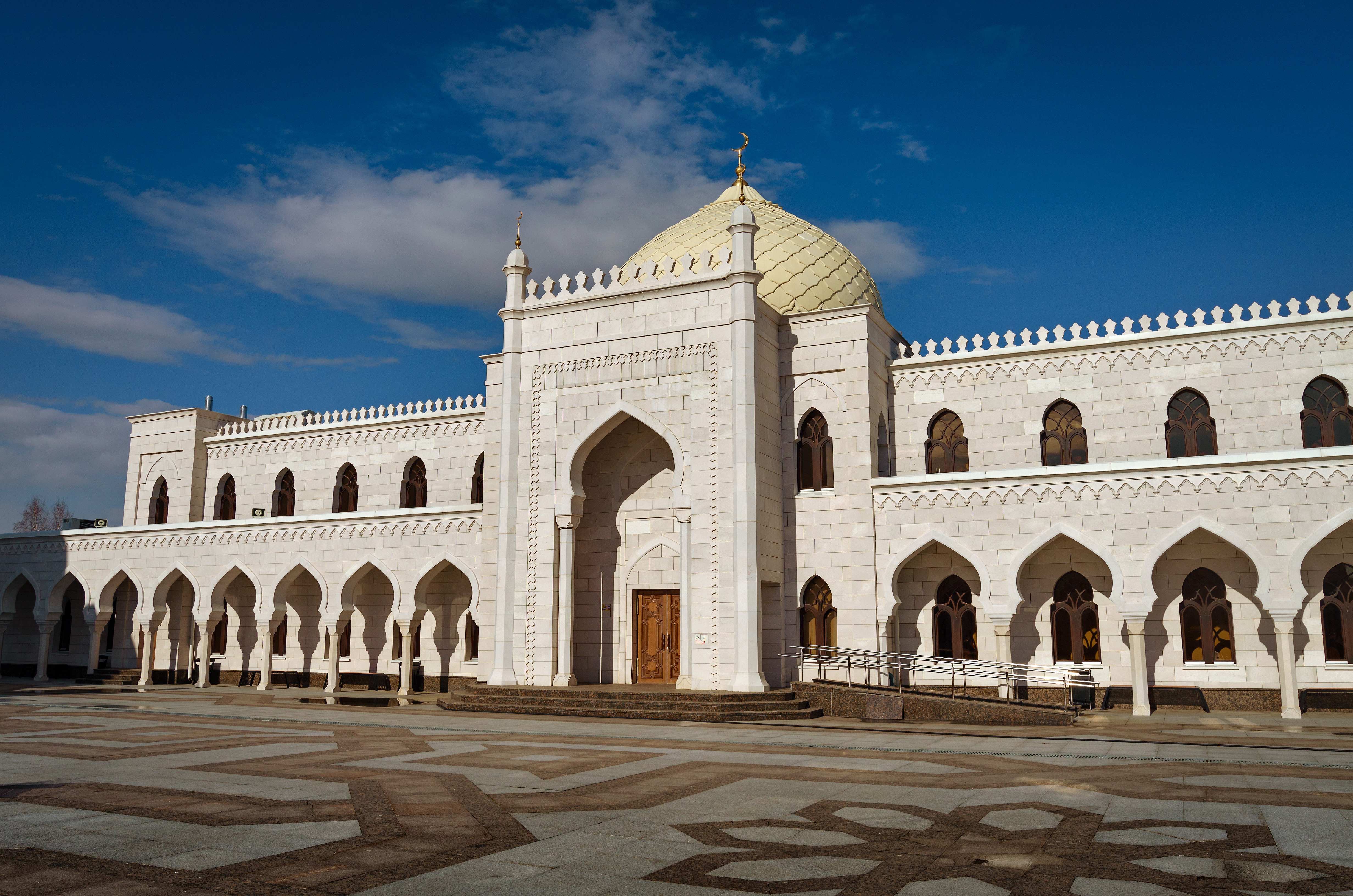 Городище Великие Булгары: Спасский район, Татарстан This image is related to the protected area of Russia number 1600162